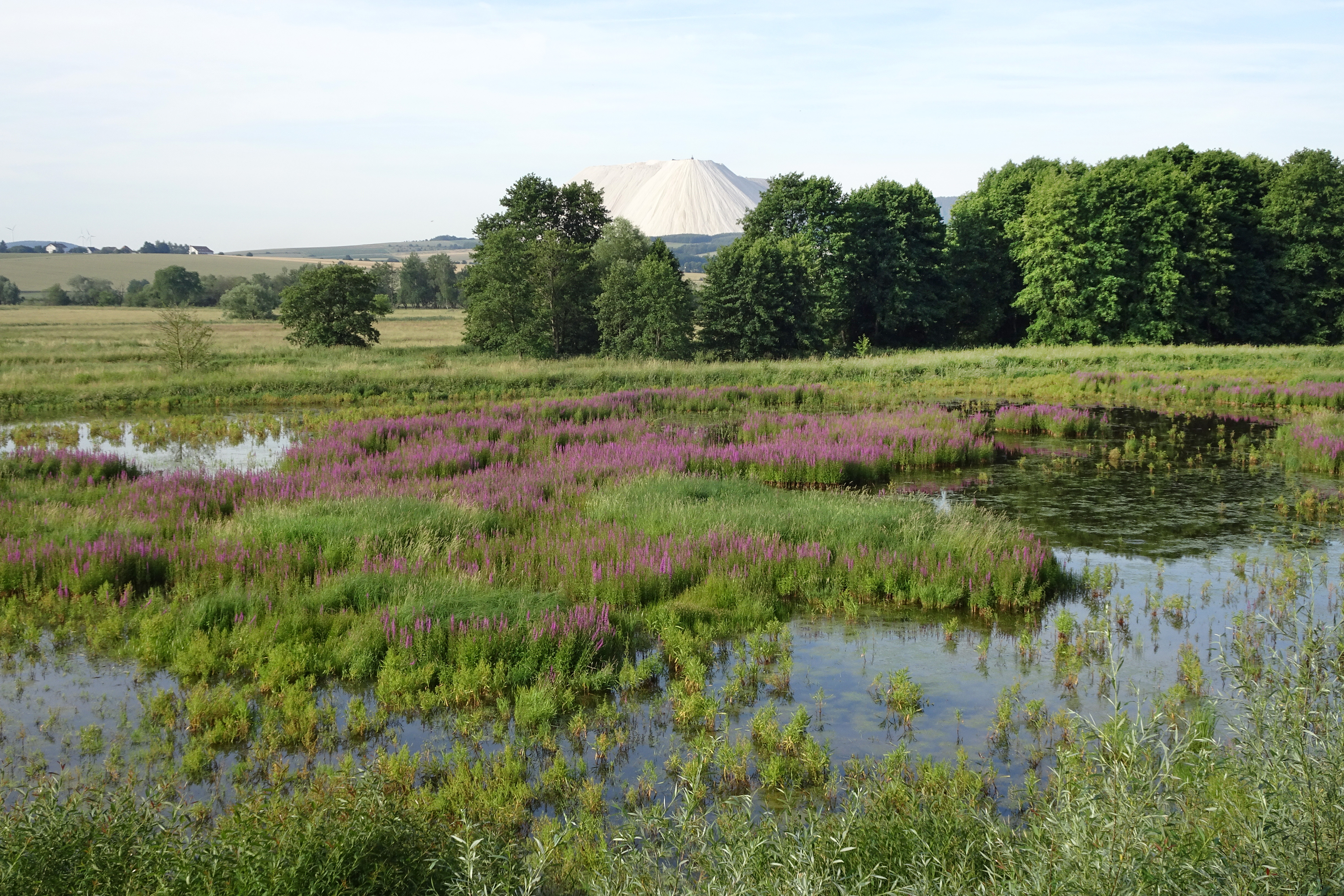 Der „Rhäden bei Obersuhl und Bosserode“ liegt in den Gemarkungen Obersuhl und Bosserode der Gemeinde Wildeck im nordosthessischen Landkreis Hersfeld-Rotenburg. Auslaugungen von Kalisalzen aus dem, aus marinen Sedimenten entstandenem Zechsteinund tektonische Vorgänge haben zu einem schrittweisen Nachsacken des Untergrunds geführt. Die einstige Sumpflandschaft wurde ab der Mitte des 19. Jahrhunderts trockengelegt und bis in die Nachkriegszeit bearbeitet. Mit dem Ausbau der DDR-Grenzanlagen verfiel das Entwässerungssystem, was zur Aufgabe der landwirtschaftlichen Nutzung führte. In den 1970er Jahren begannen Naturschützer mit den Arbeiten zur Rückführung des Rhädens zu einem Feuchtbiotop, um den in ihrem Bestand bedrohten Pflanzen- und Tierarten einen angemessenen Lebensraum zu sichern. Nach abgeschlossener Rekultivierung war (wieder) eine Auenlandschaft entstanden, die vor allem für Vogelarten als Brut-, Nahrungs- und Rastgebiet überregionale Bedeutung besitzt.